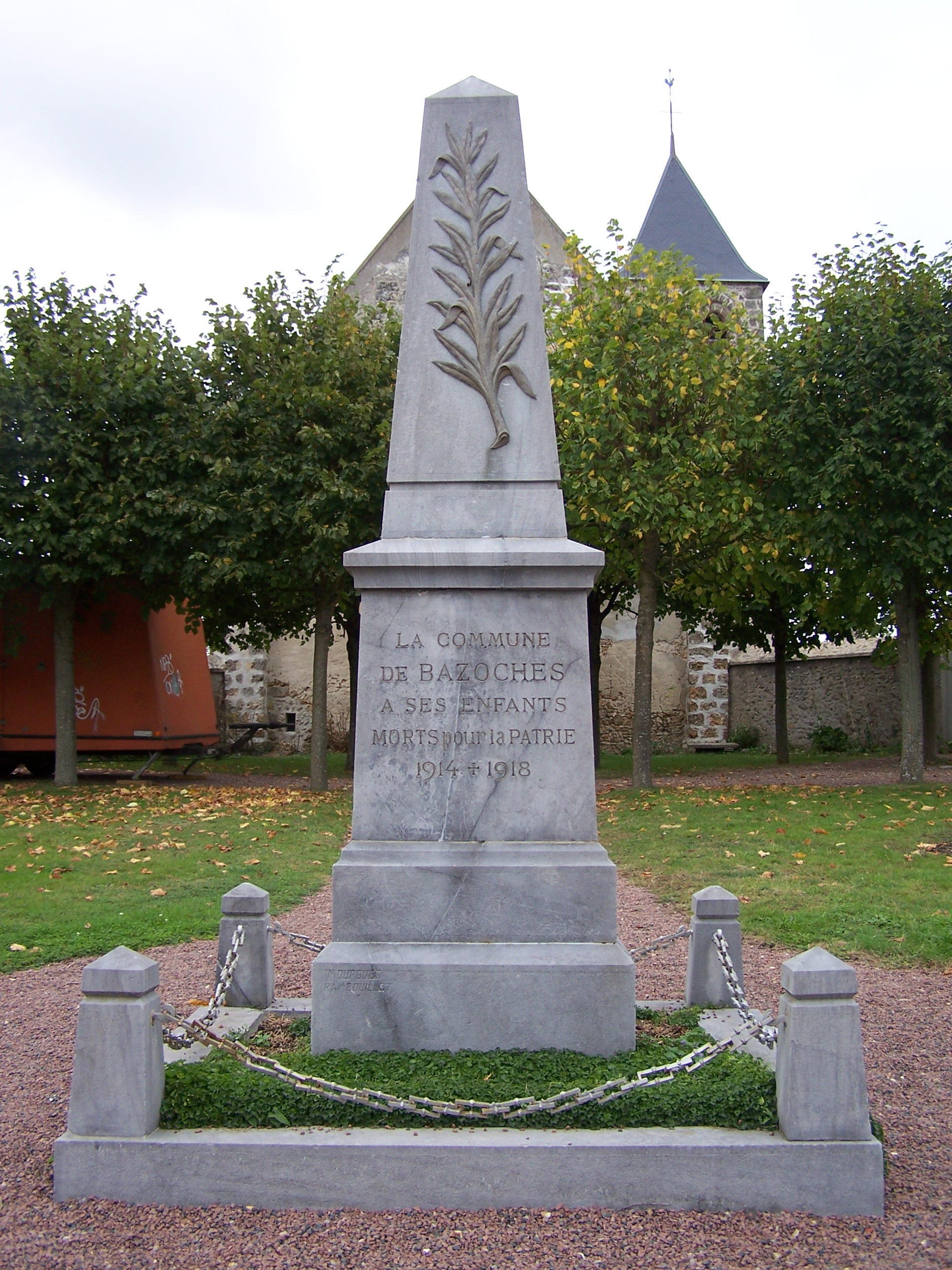 Monument aux morts de Bazoches-sur-Guyonne (Yvelines, France)